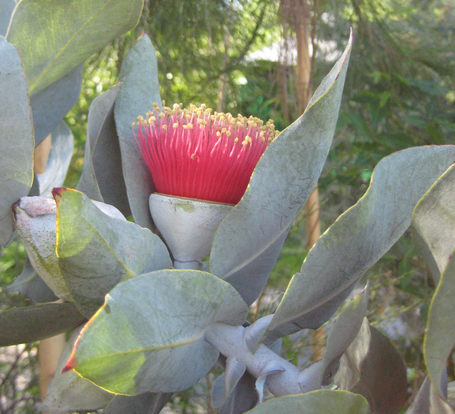 Eucalyptus macrocarpa im Botanischen Garten Dresden